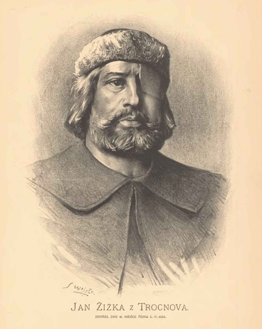 Portréty českých osobností od Jana Vilímka